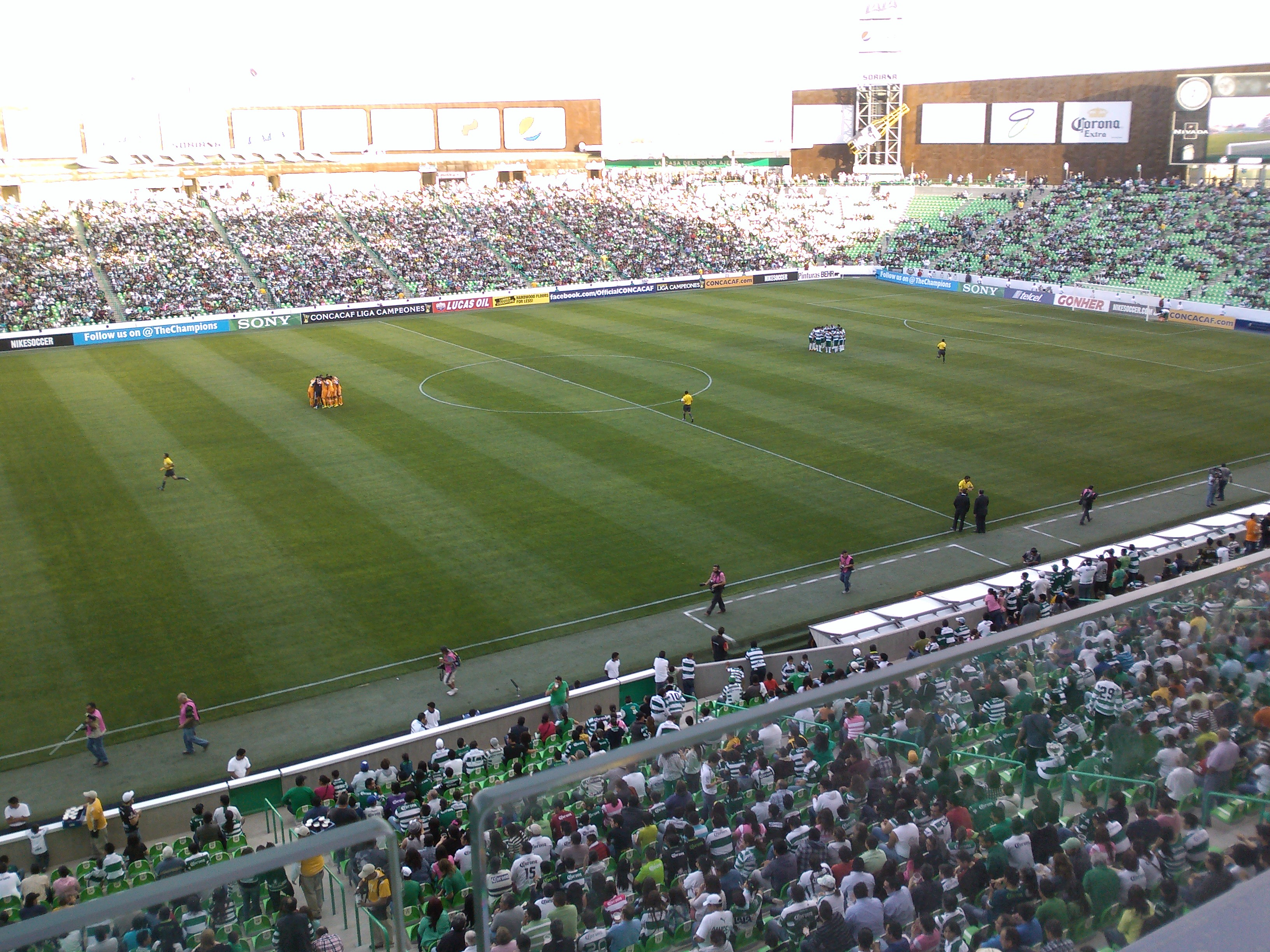 Un partido entre Santos Laguna y Houston Dynamo correspondente a los cuartos de final de la Concacaf Liga Campeones 2012-2013